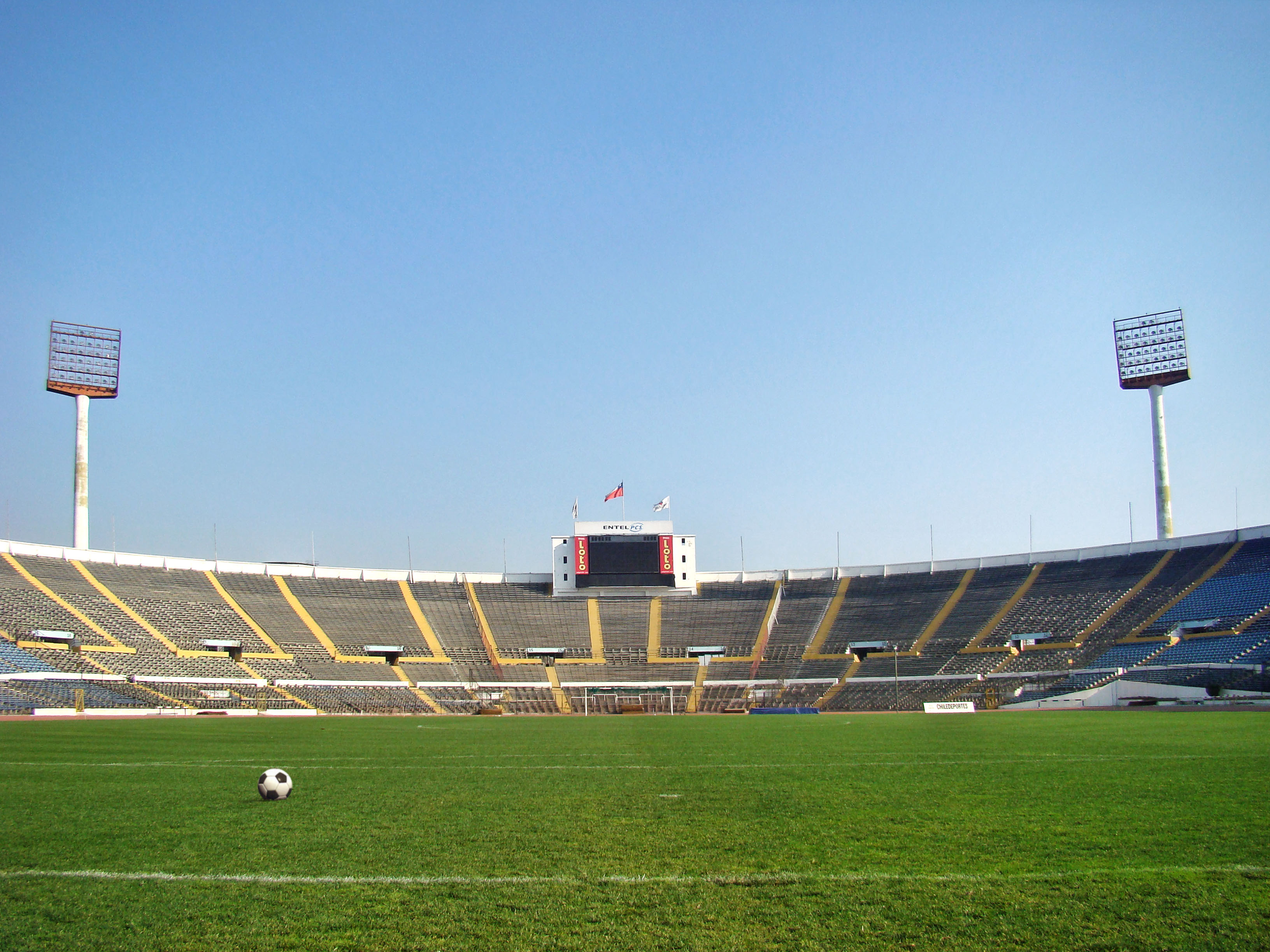 Estadio Nacional This is a photo of a national monument in Chile: 592